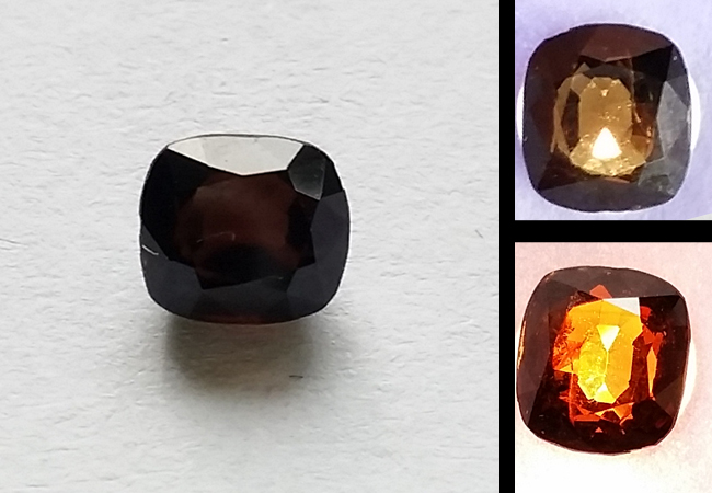 Facettierter Painit, 0,86ct, gefunden in der Thurein Taung Mine in Mogok Myanmar (Burma)